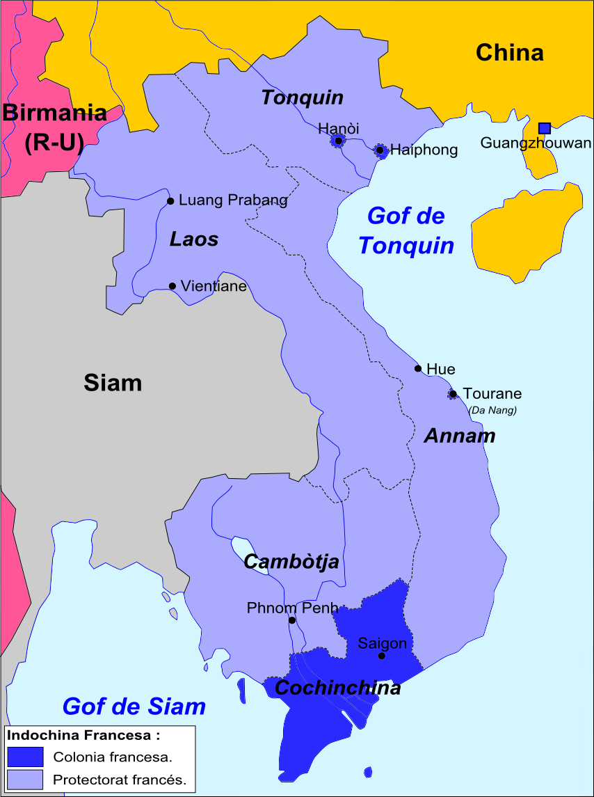 Organizacion territòriala de l'Indochina Francesa.